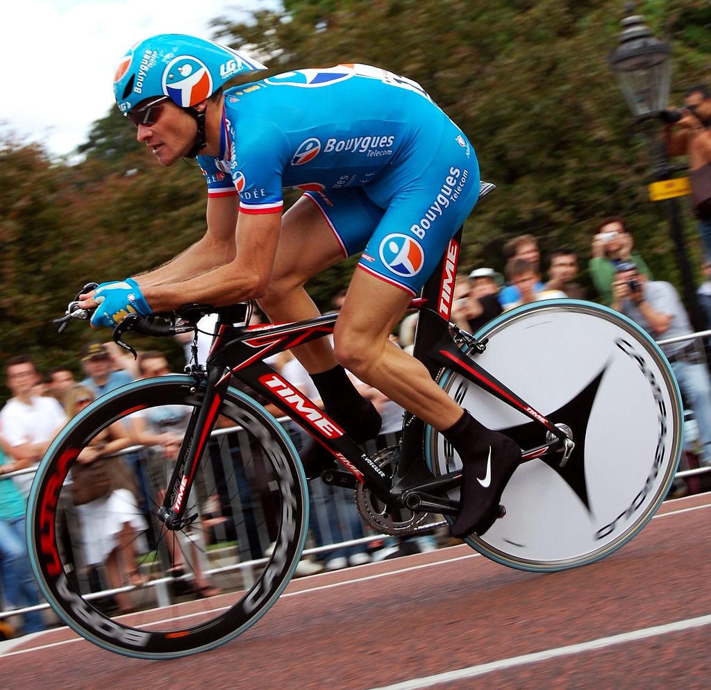 El Tour de France en London!!!! En la foto: Thomas Voeckler